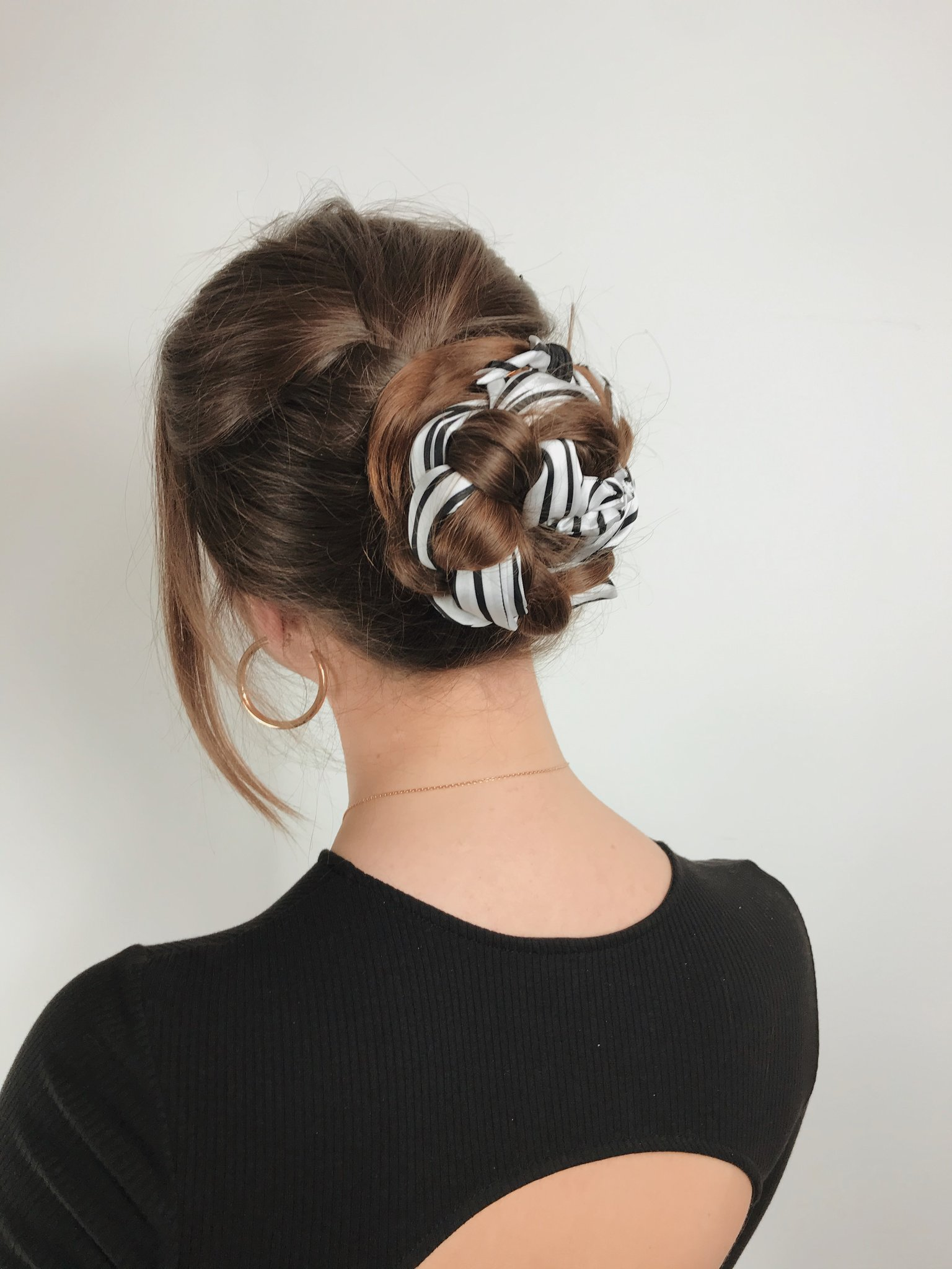 Foulchie chignon